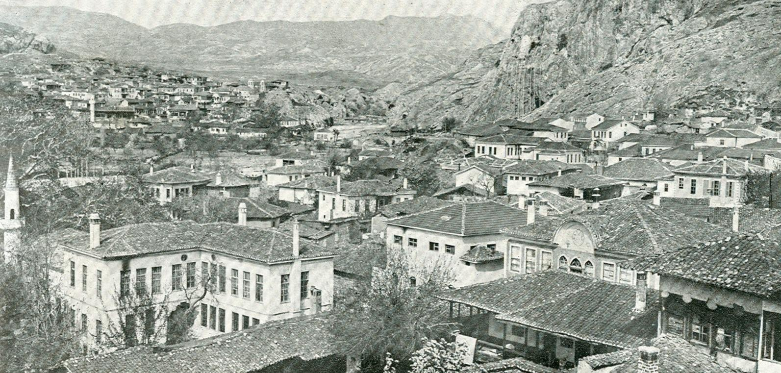 Валовища в началото на 20 век. Снимка от алманаха "Македония в образи", София, 1919.